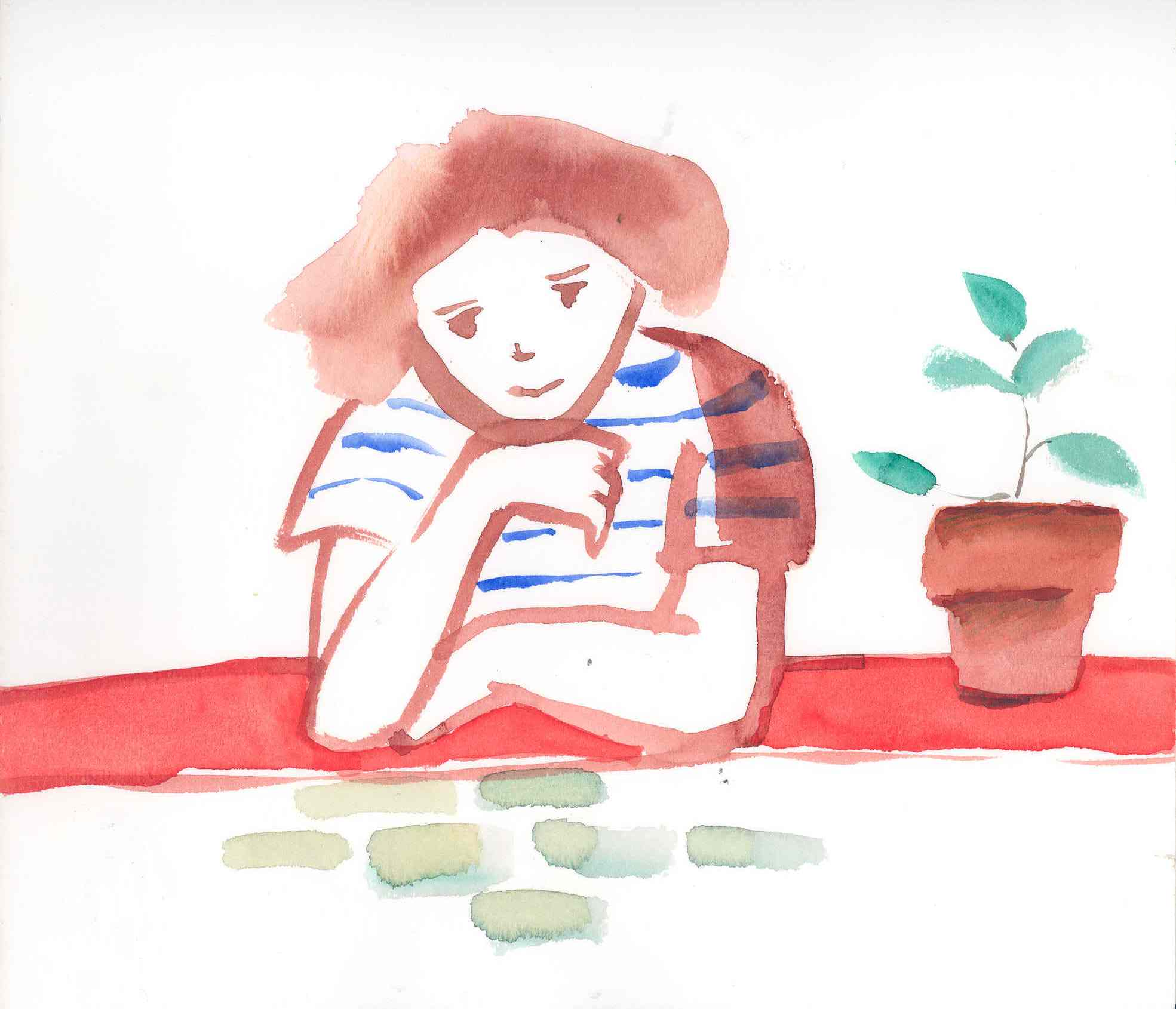 "Amona zure Iholdi" libururako Asun Balzolak egindako marrazkia. Donostiako Haur Liburuaren Dokumentaziogunean dago jatorrizkoa